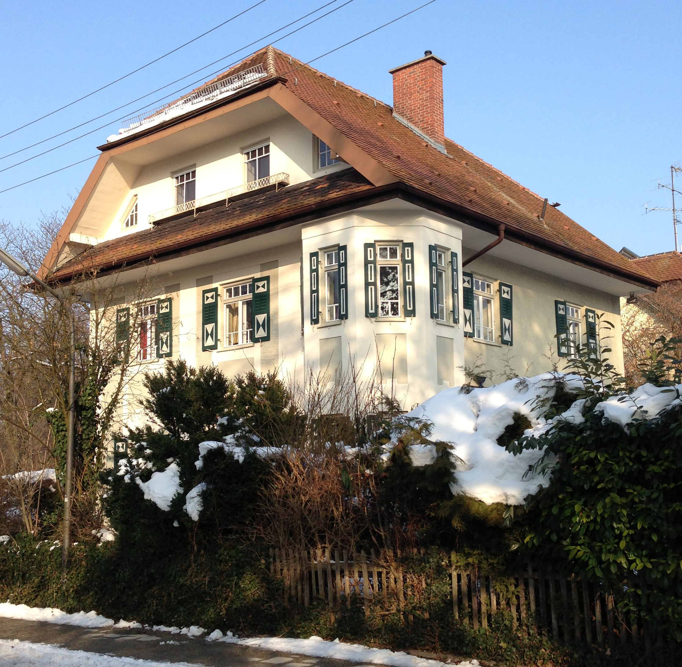 Marsopstr 6, München